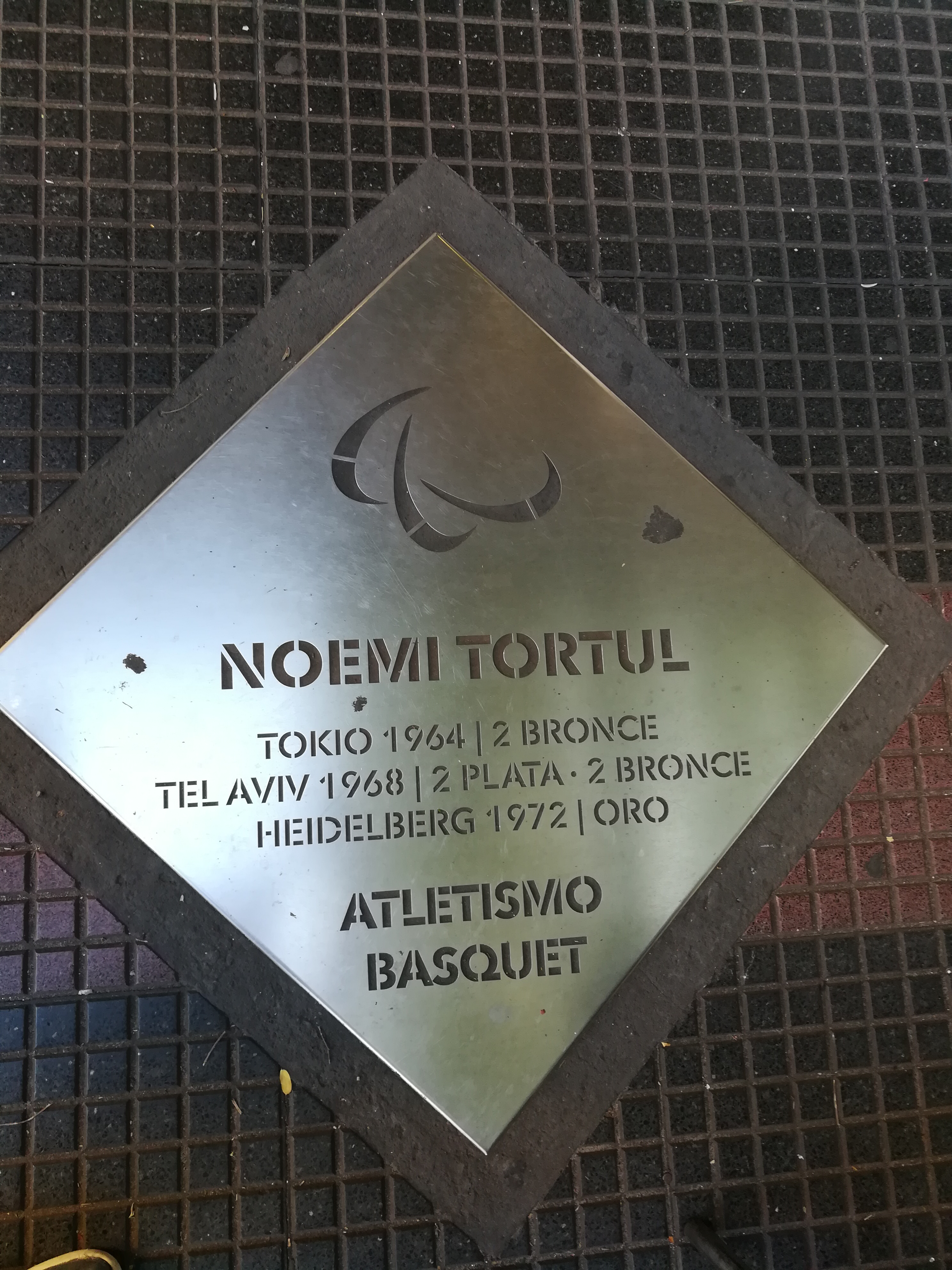 Paseo de los Olímpicos de los en la Avenida Pellegrini (Rosario).